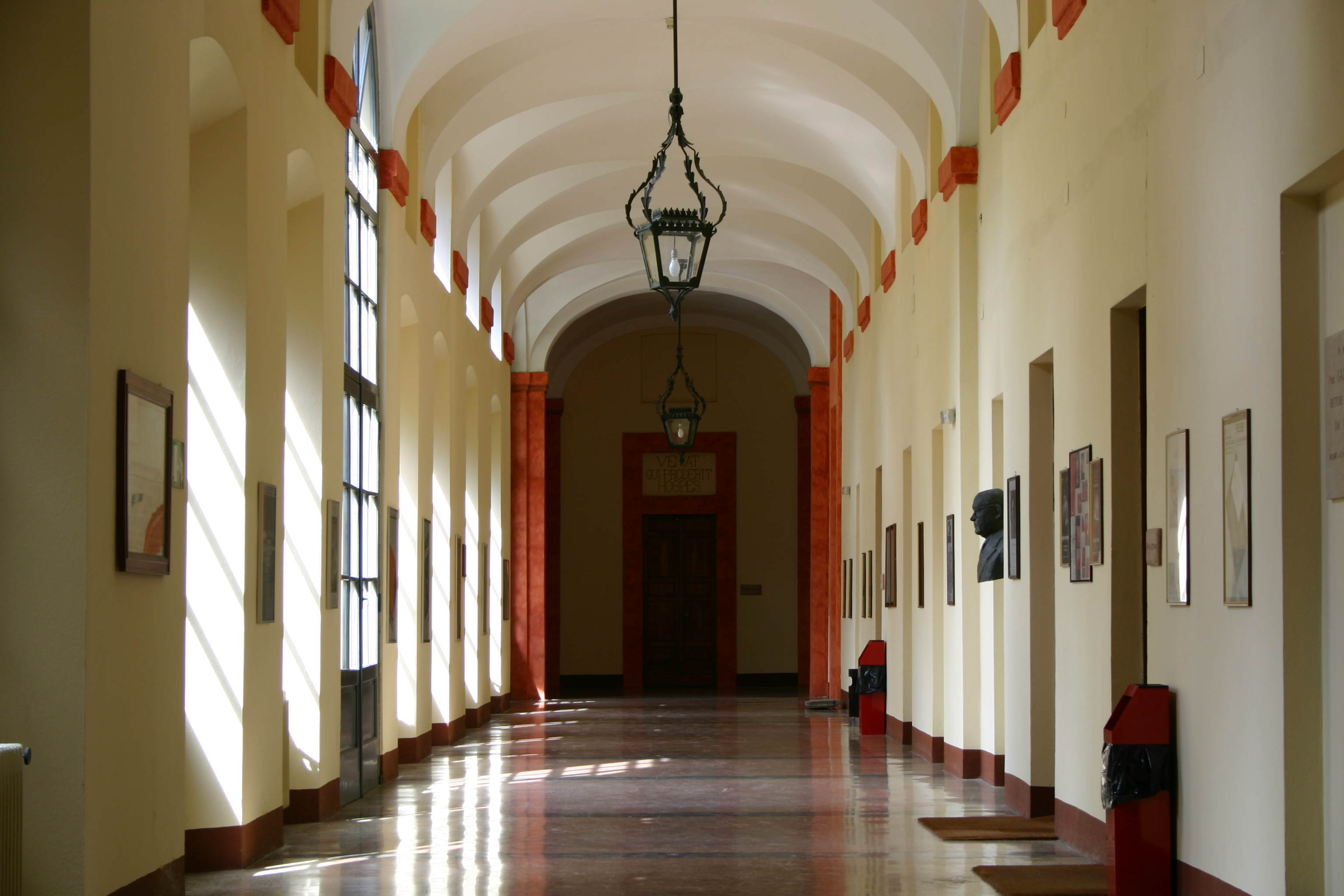 uno dei corridoi del Collegio Cairoli